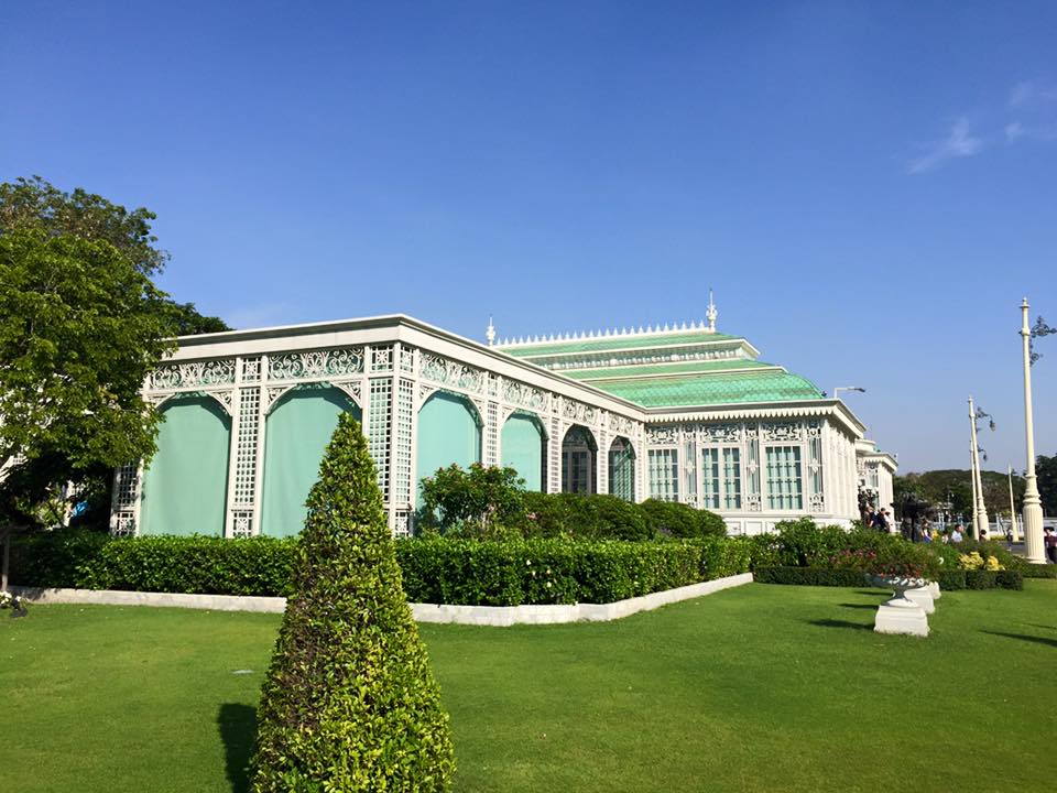 Chitralada